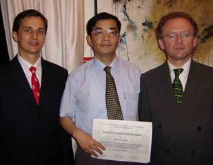 Michael Prochazka und Andreas Maislinger bei der Verleihung des Austrian Holocaust Memorial Award an Professor Pan Guang in Shanghai (2006)